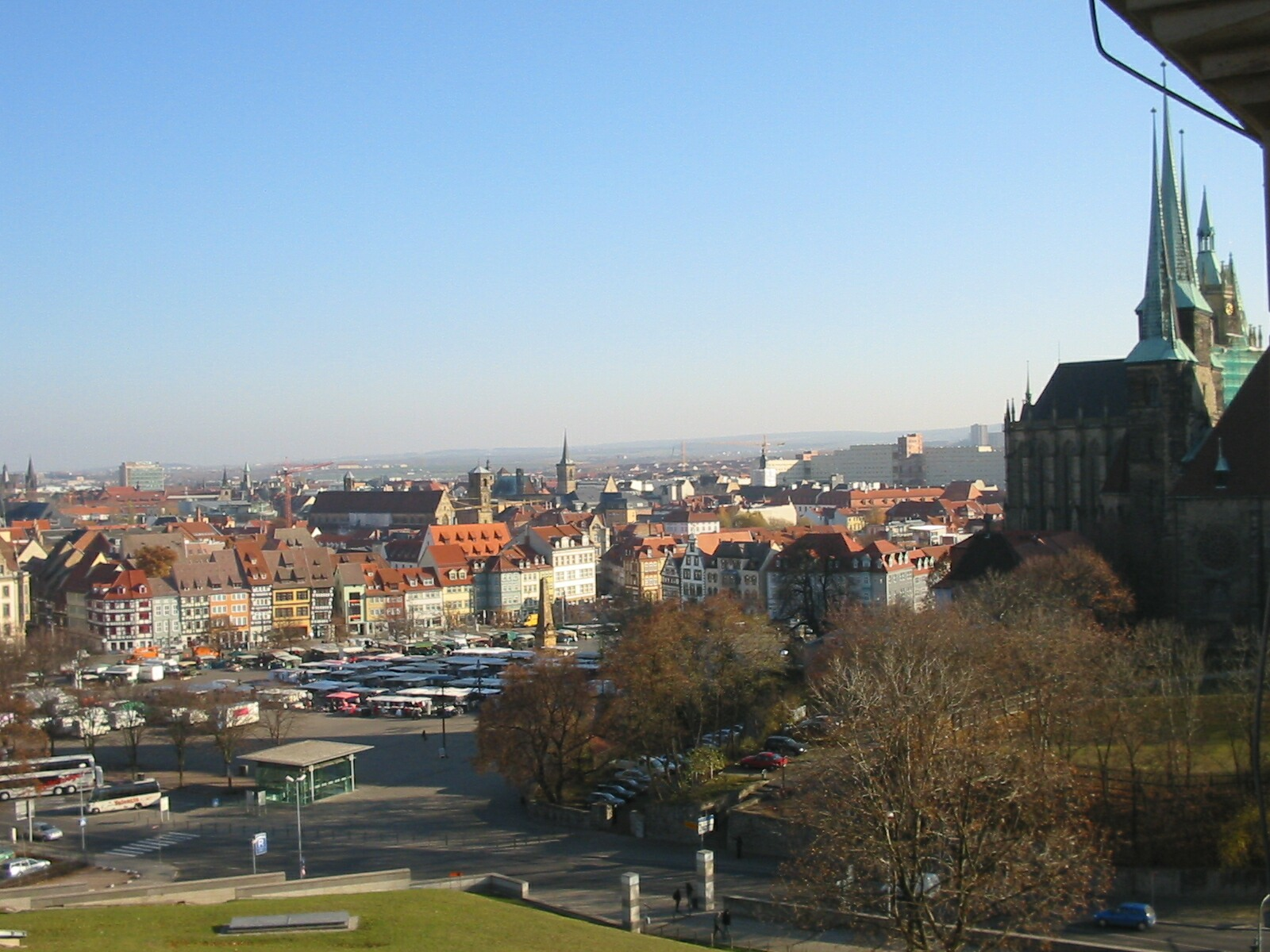 Erfurt vom Petersberg aus.